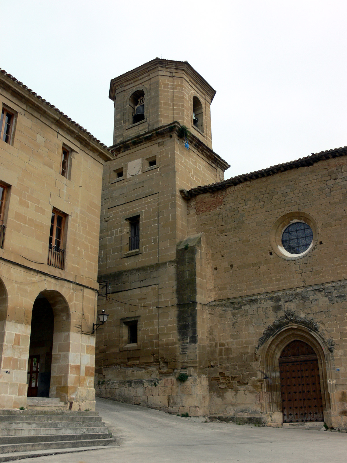 Iglesia de Santa María la Mayor en Treviana (La Rioja, España)